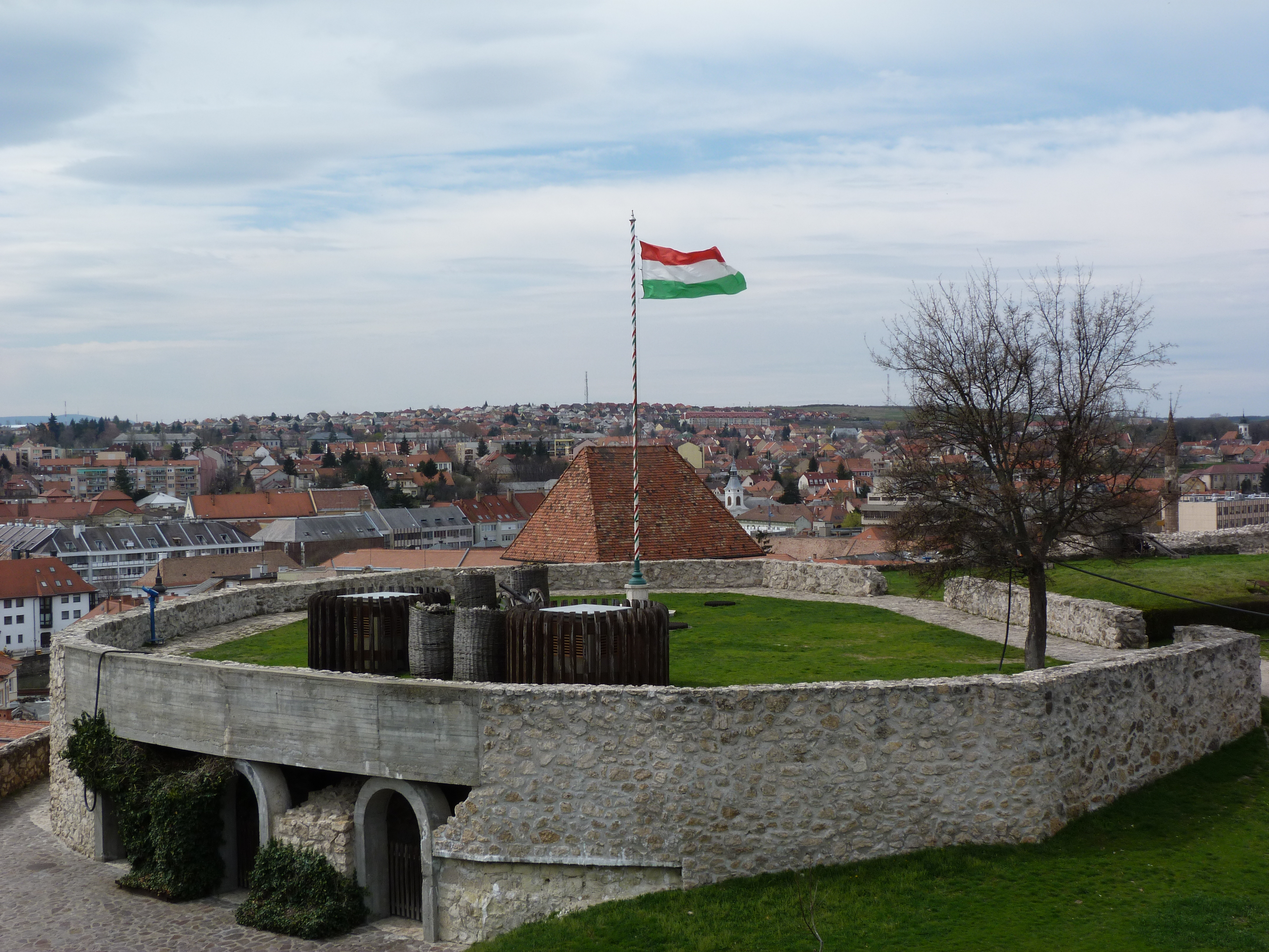 A felvétel 2013. Április 17 –én, szerdán készült Egerben. Eger vára. Forrás: egrivar.hu varbaratikoreger.hu